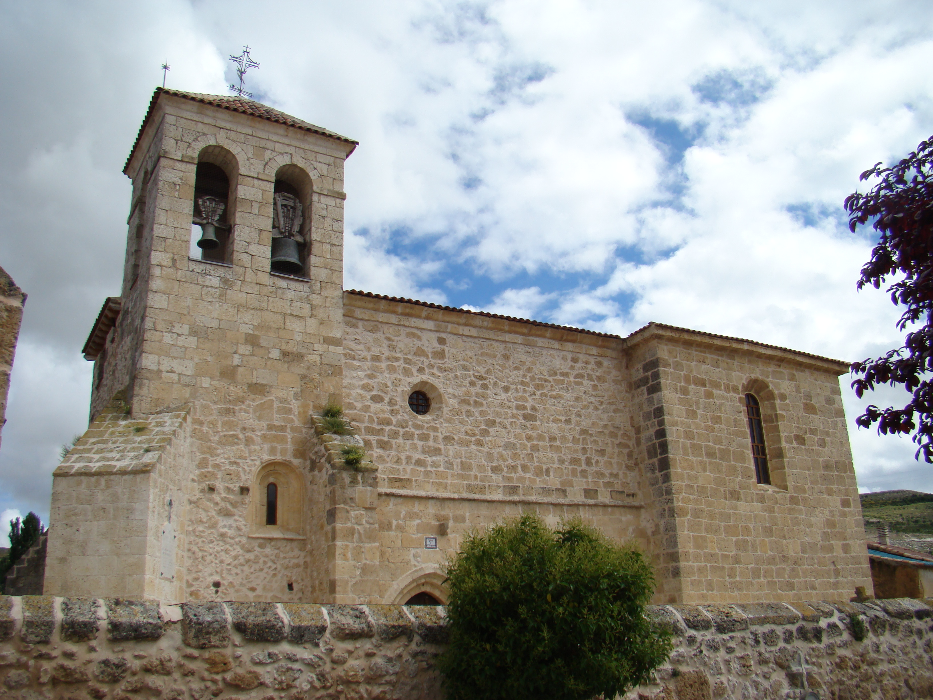 Olmos de Peñafiel provincia de Valladolid, España. Iglesia de Santa Engracia.